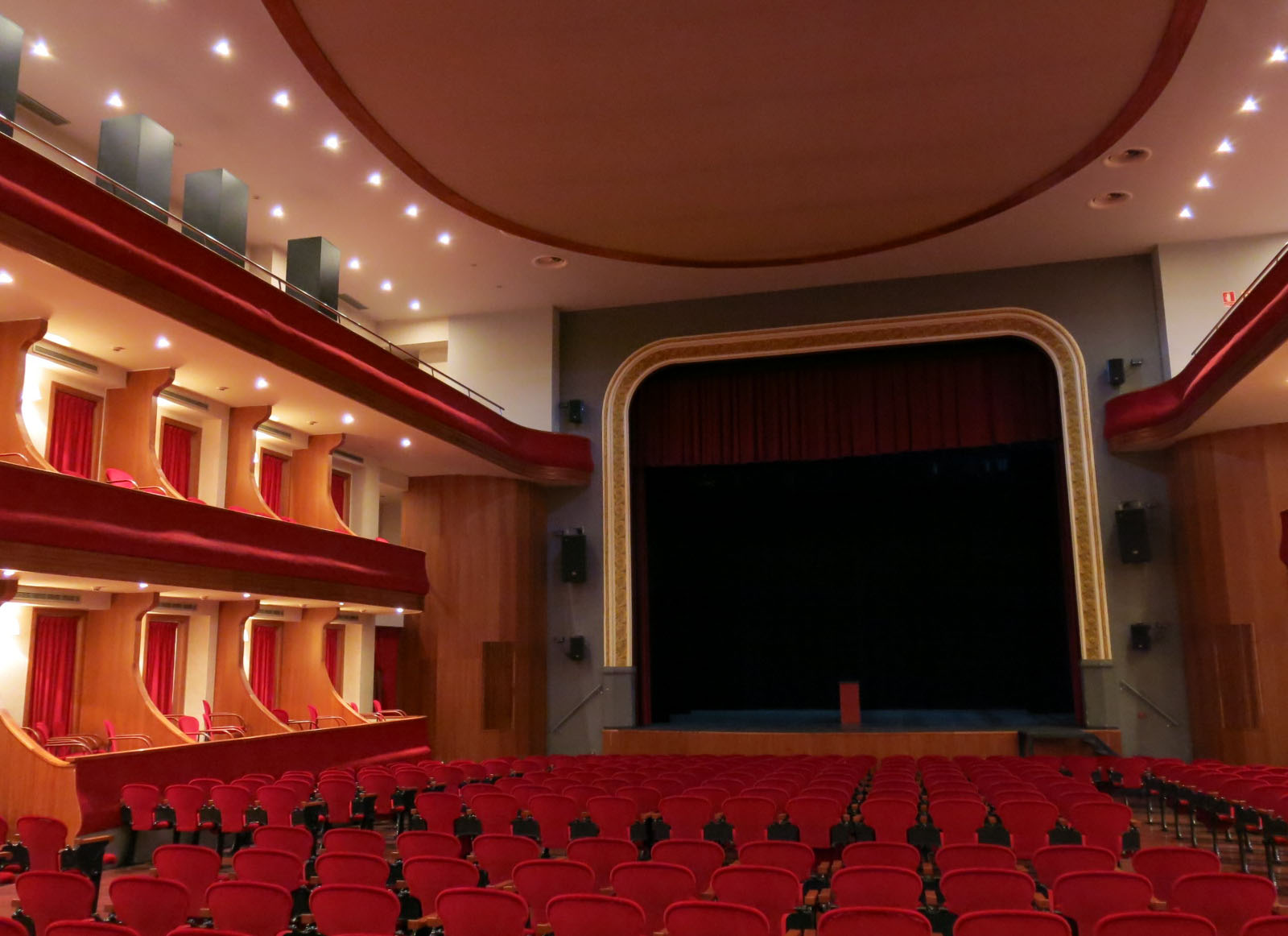 Societat Recreativa l'Amistat (Mollerussa)